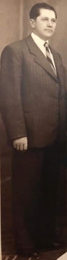 Portretul domnului Stan Săraru, politician român, membru al Partidului Național Liberal, primar al orașului Buzău, România, în perioada 1933-1937.